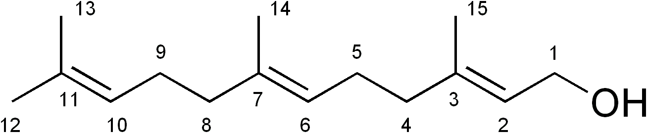 wzór chemiczny farnezolu.Wykonano 24.08.06. autor Milena Skalska